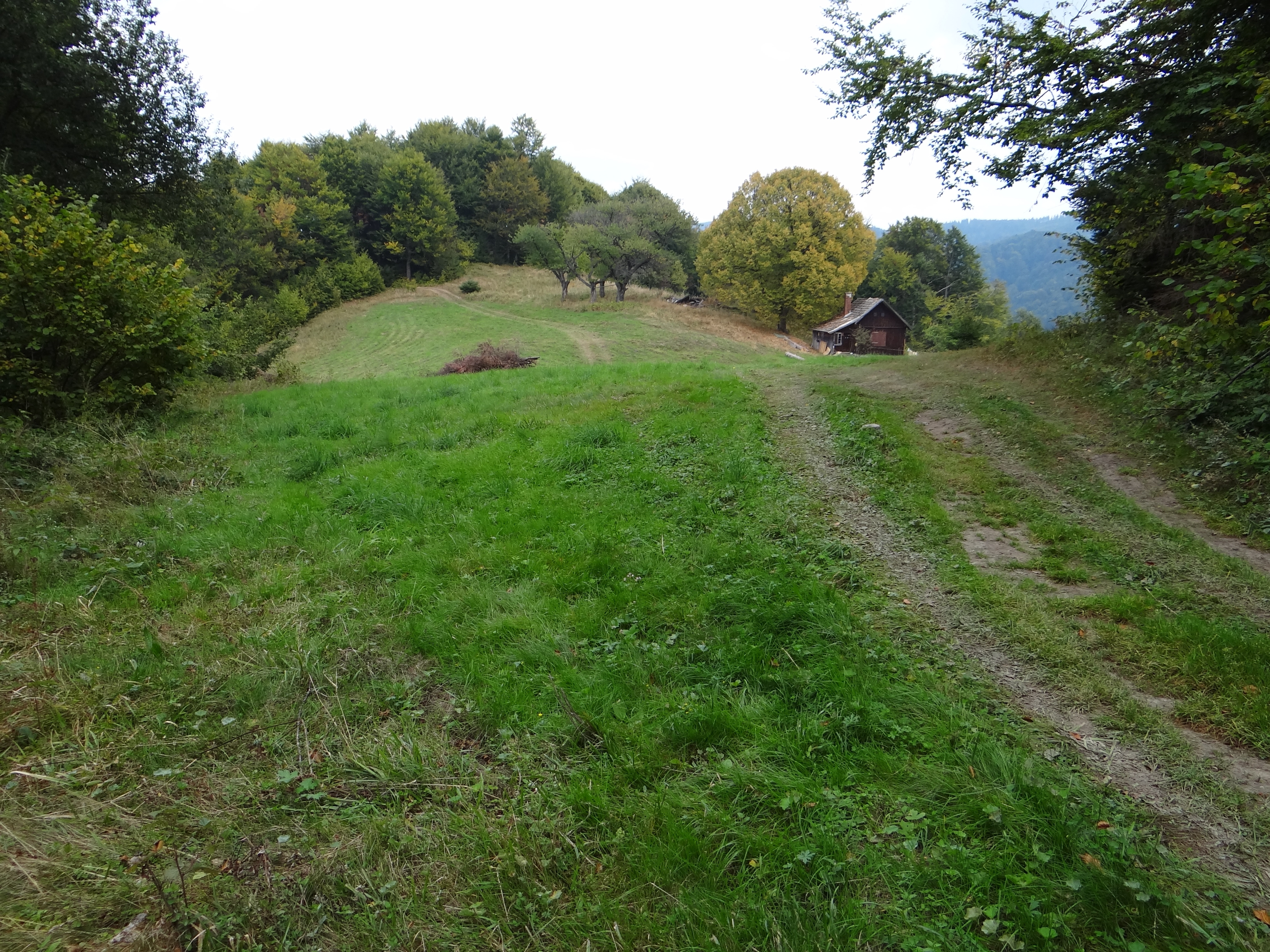 Polana Cieluszki w Beskidzie Sądeckim